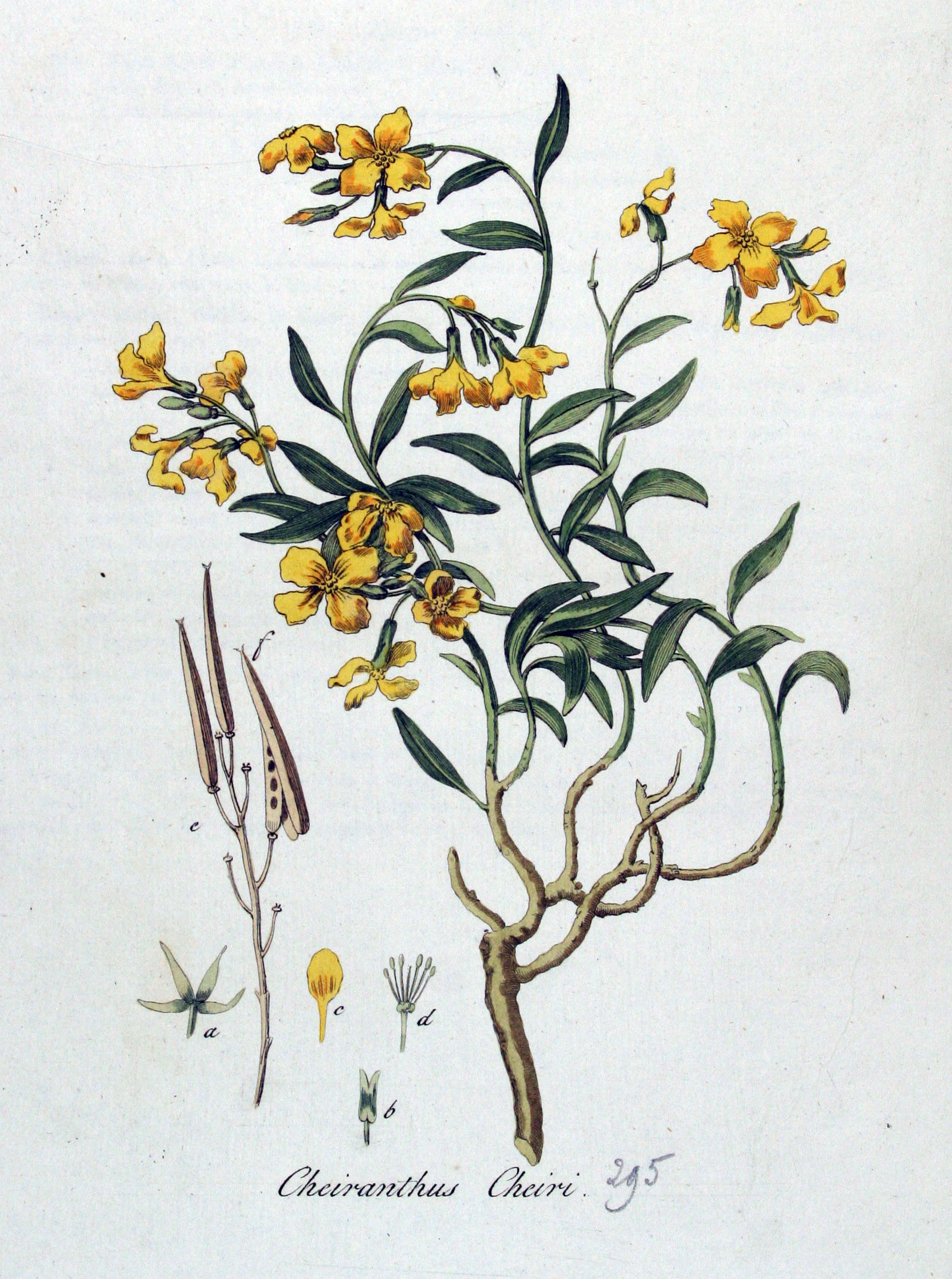 Erysimum cheiri (L.) Cranz (Syn. Cheiranthus cheiri L.